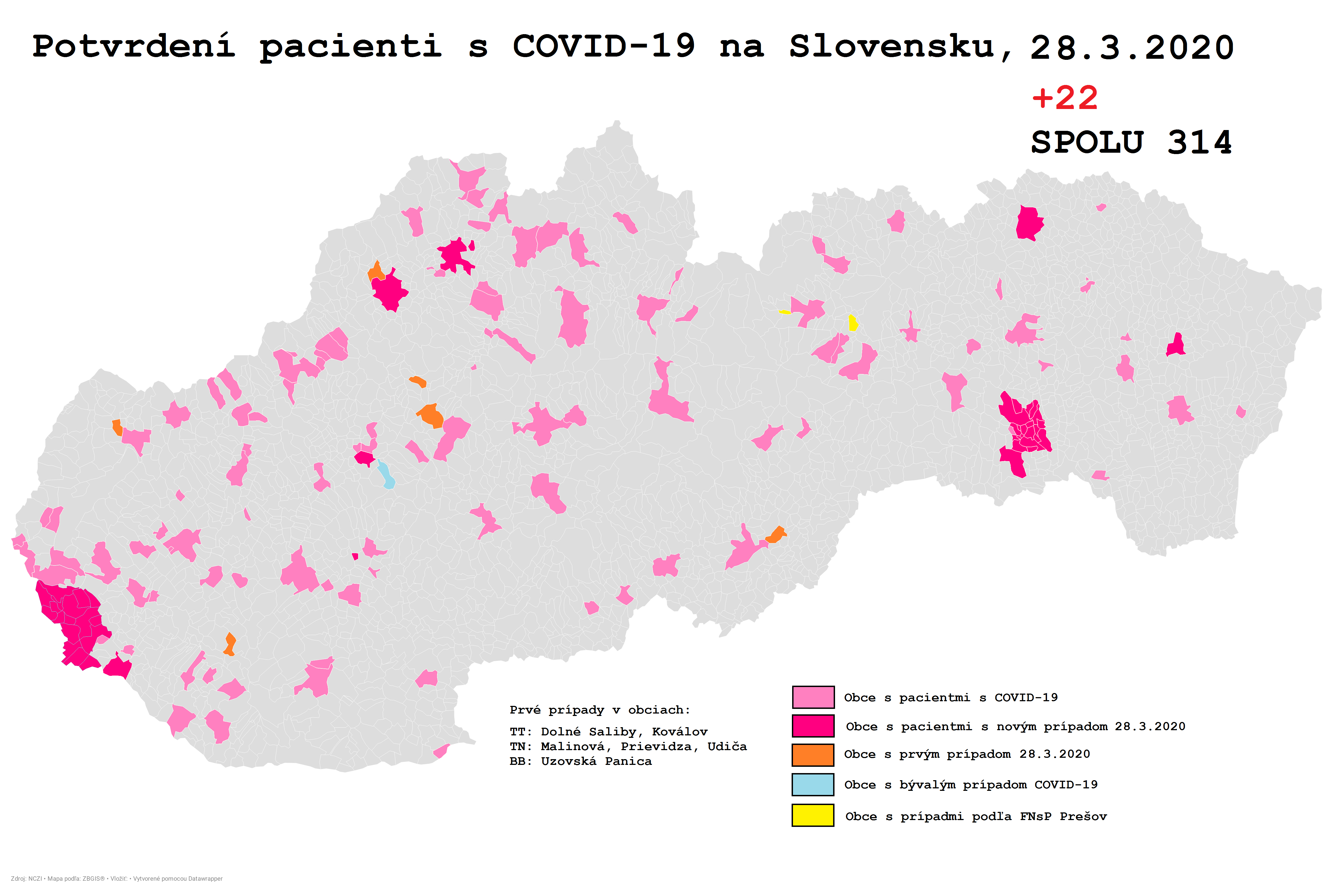 Vyfarbené sú obce, v ktorých bol potvrdený prípad ochorenia COVID-19, vysvetlivky sú súčasťou obrázku.